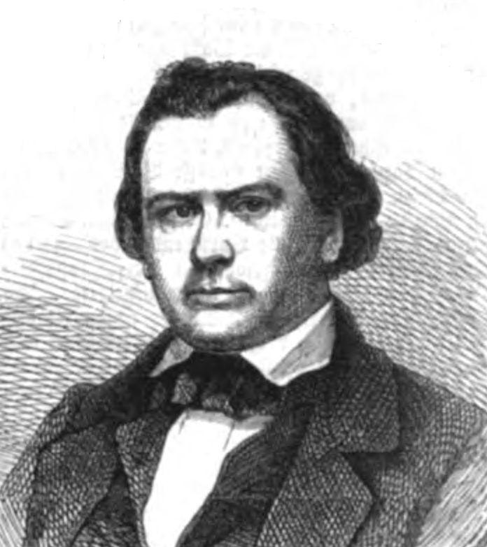 Karl Wippermann, Abgeordneter der kurhessischen Ständeversammlung, 1863.